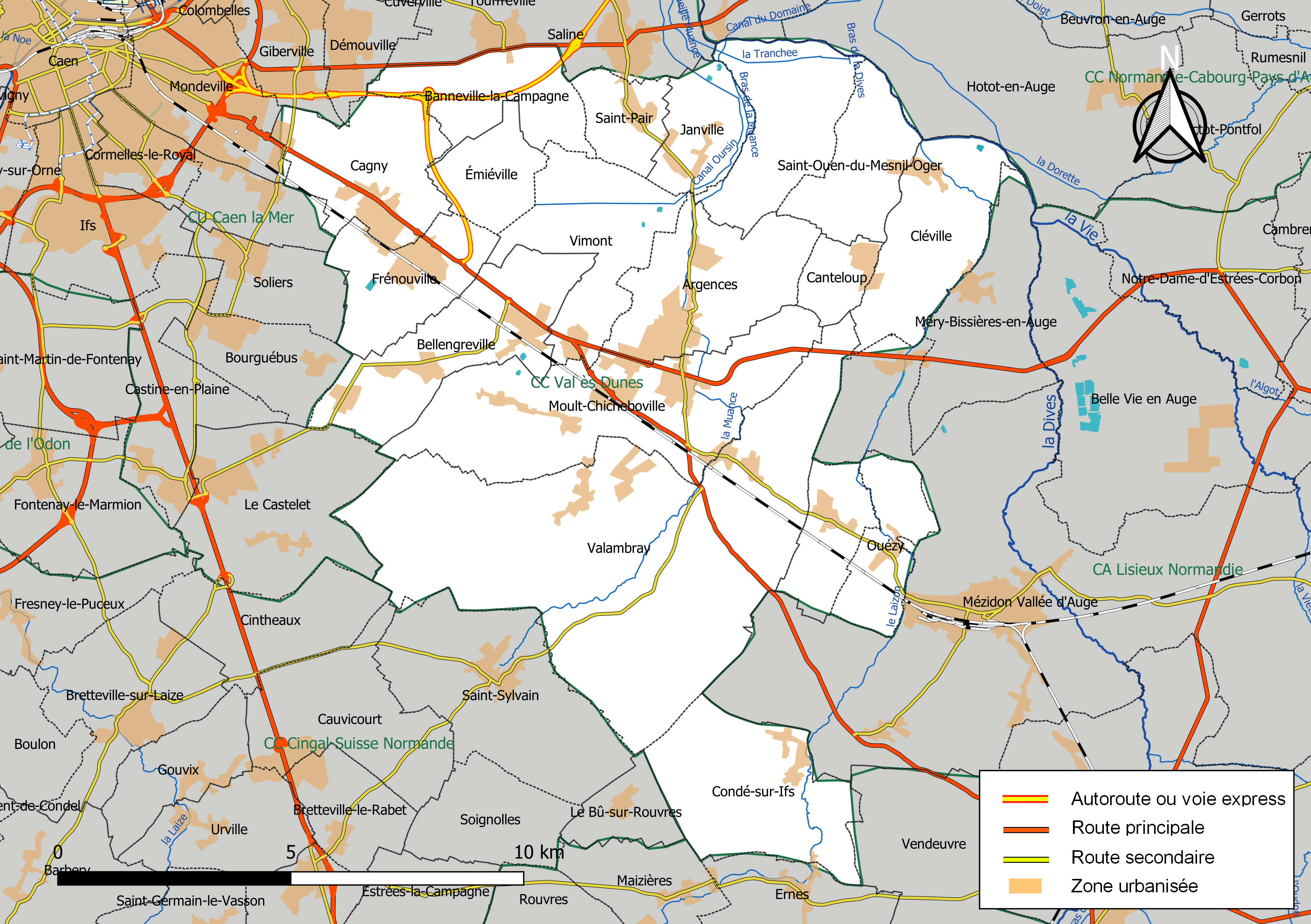 Carte géographique de la Communauté de communes Val ès Dunes, département du Calvados, France. Composition au 1er janvier 2019.